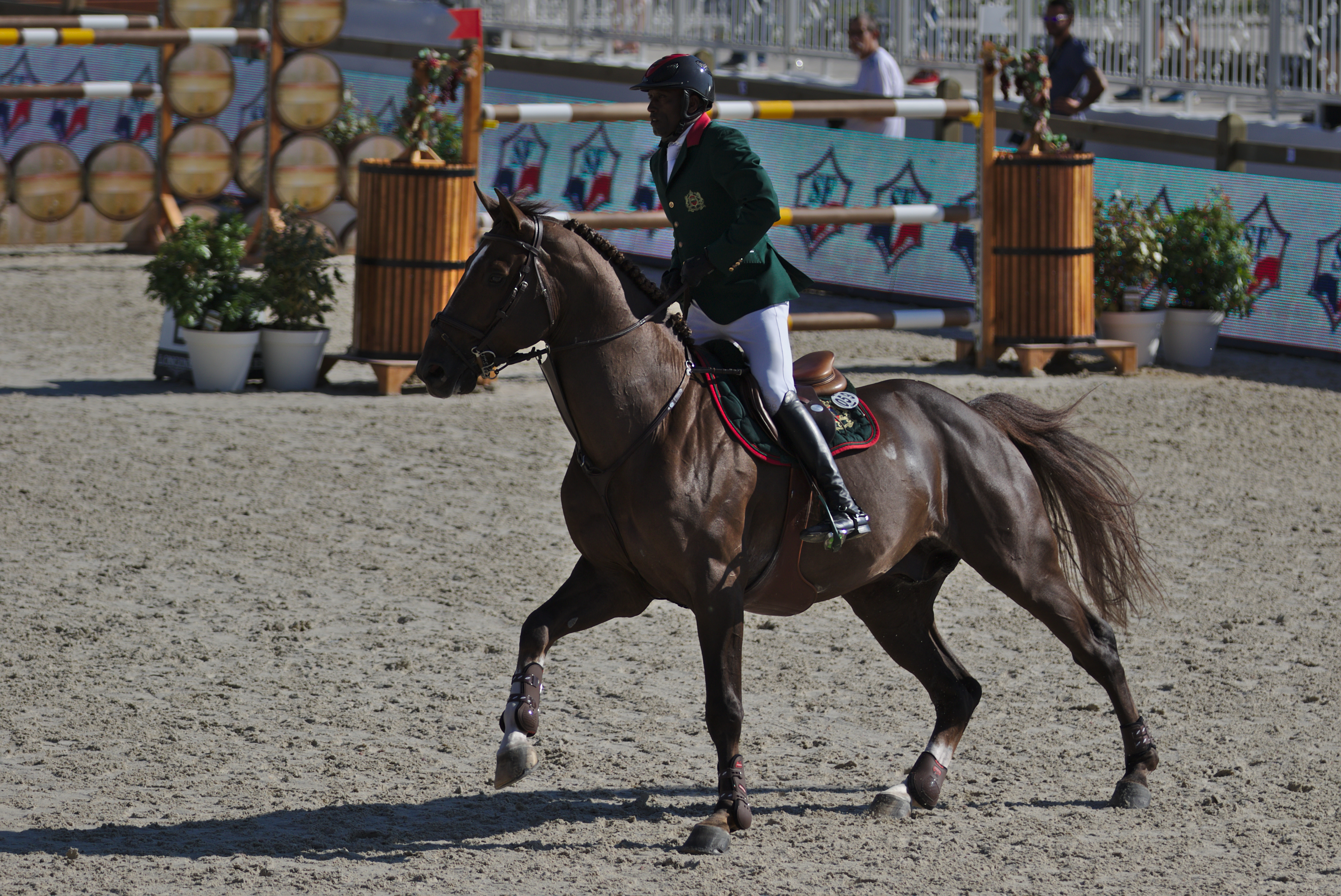 ILHS 2016 - 20160909 - Abdelkebir Ouaddar et Saphir du Talus